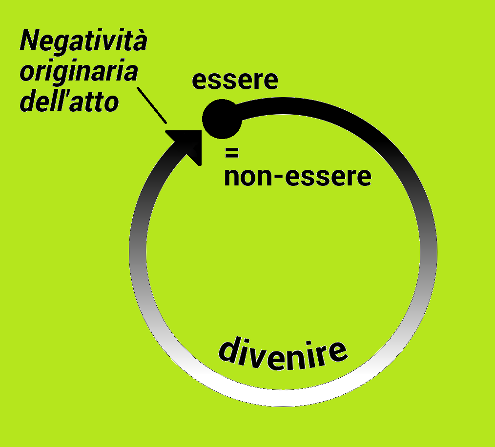 Schema della negatività originaria nell'idealismo attuale di Giovanni Gentile, che la raffigura come circolo.